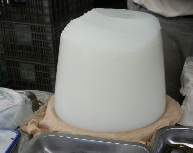 南京路边摊出售的凉粉